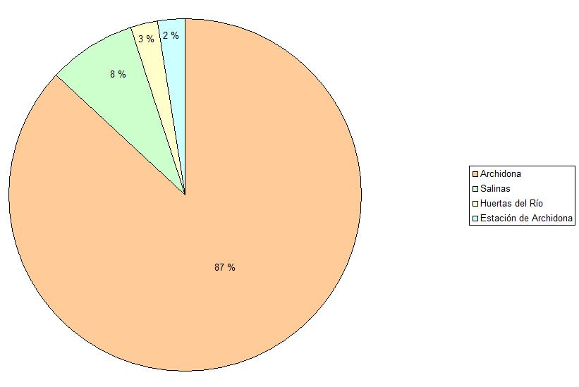 Répartition de la population d'Archidona (Espagne) dans les différents centres de peuplement, en 2009-2010.